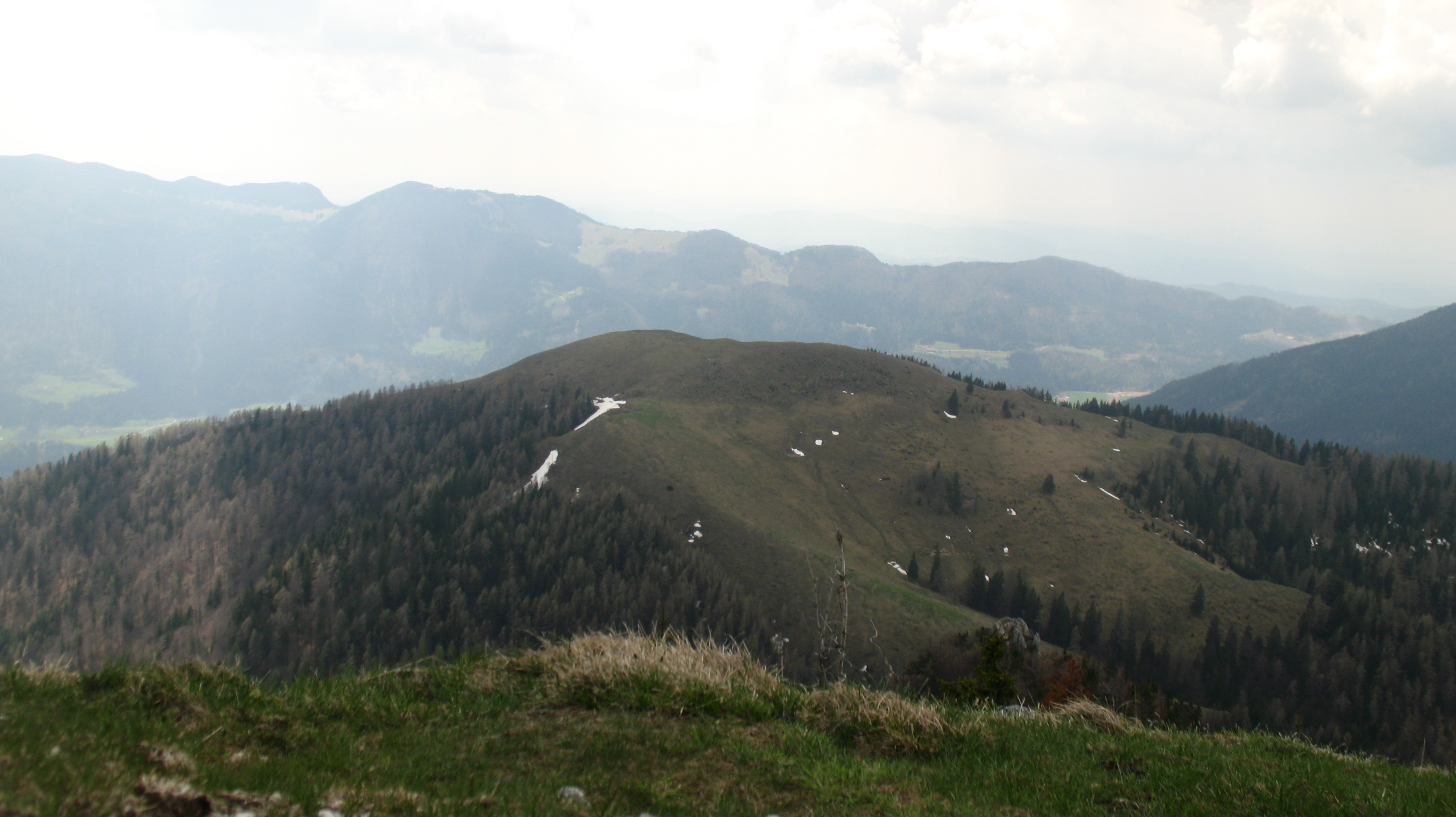 Slika Lepenatke posneta z vrha Velikega Rogatca.